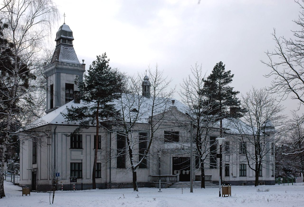 Husův sbor Ostrava-Michálkovice